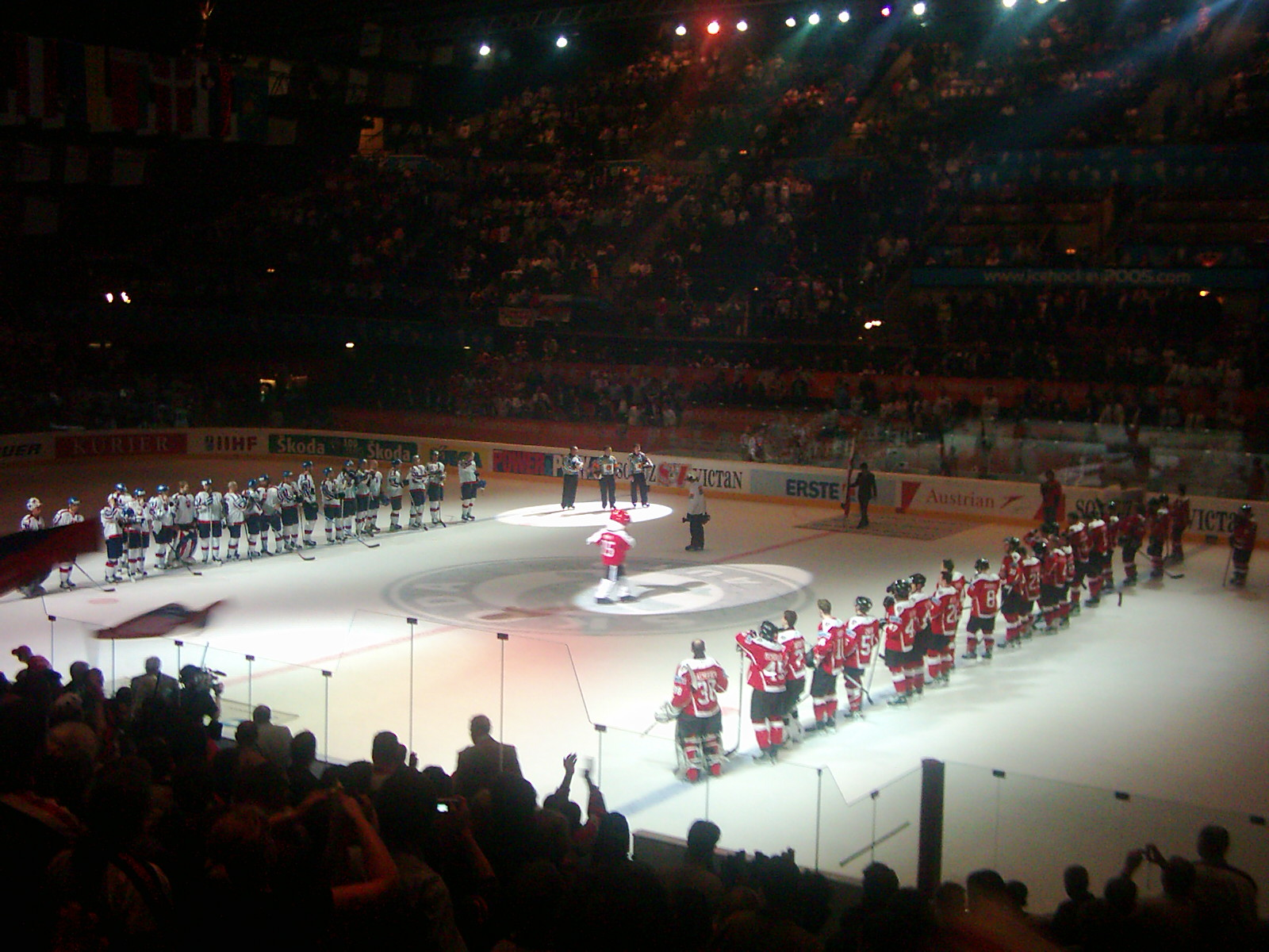 Eishockey-WM in Wien: Österreich gegen Slowakei - nach dem Spiel